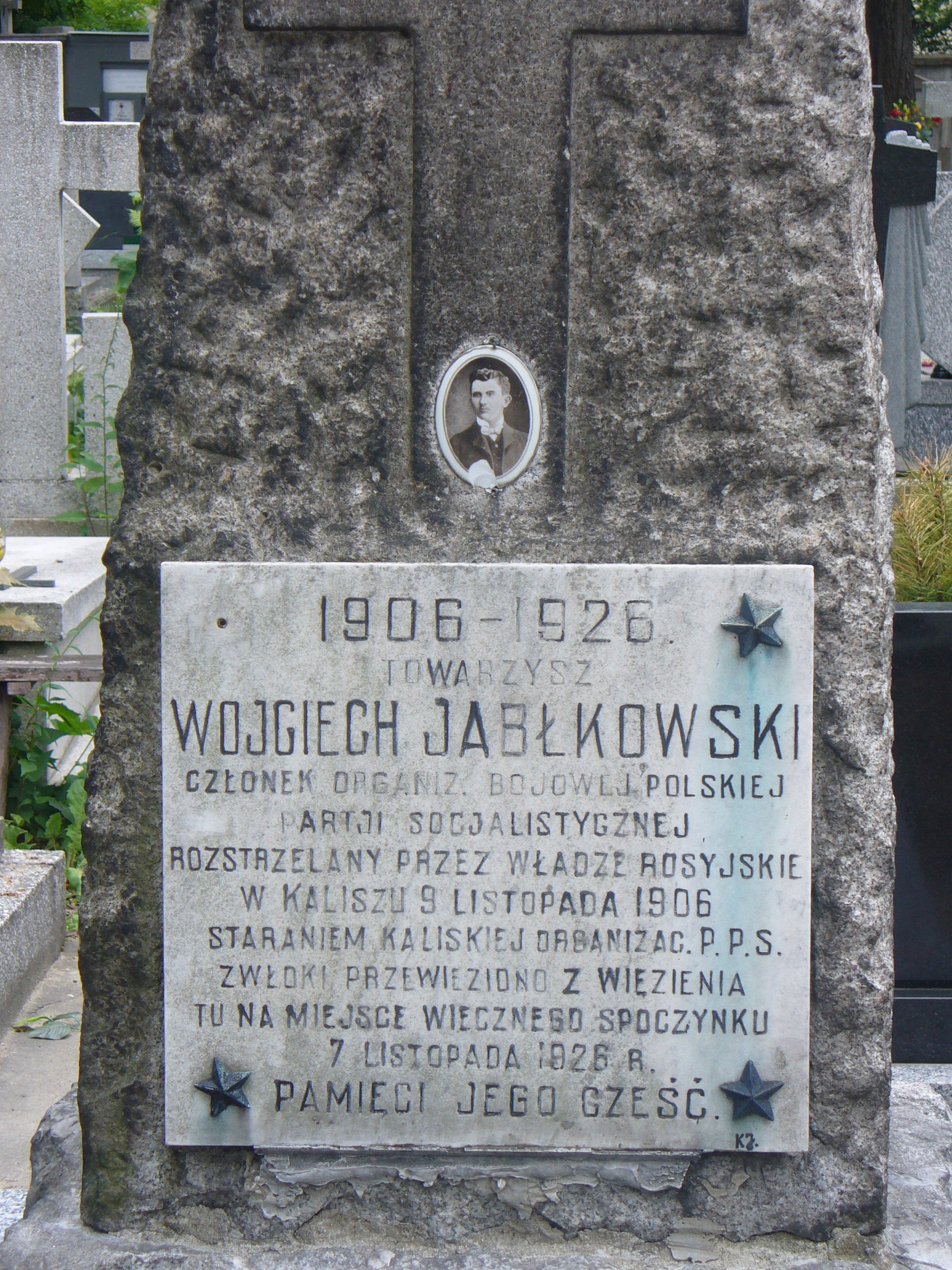 Nagrobek Wojciecha Jabłkowskiego na Cmentarzu Miejskim w Kaliszu